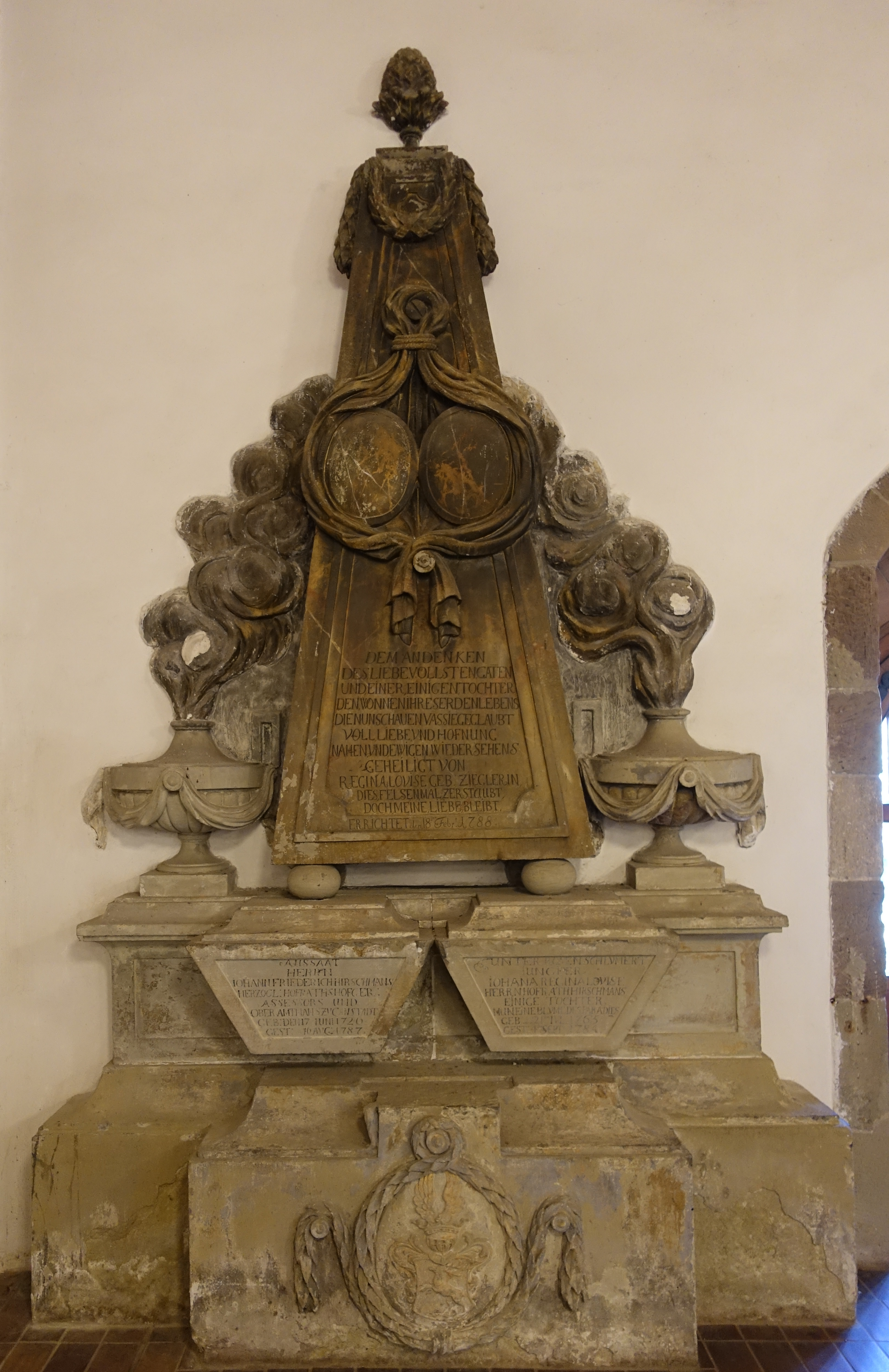 Epitaph an der Westseite in der Uffkirche auf dem Uff-Kirchhof in Stuttgart-Bad Cannstatt für den Cannstatter Hofrat, Hofgerichtsassessor und Oberamtmann Johann Friedrich Hirschmann (1726–1787) und seine Tochter Regina Louise Hirschmann (1765–1784).